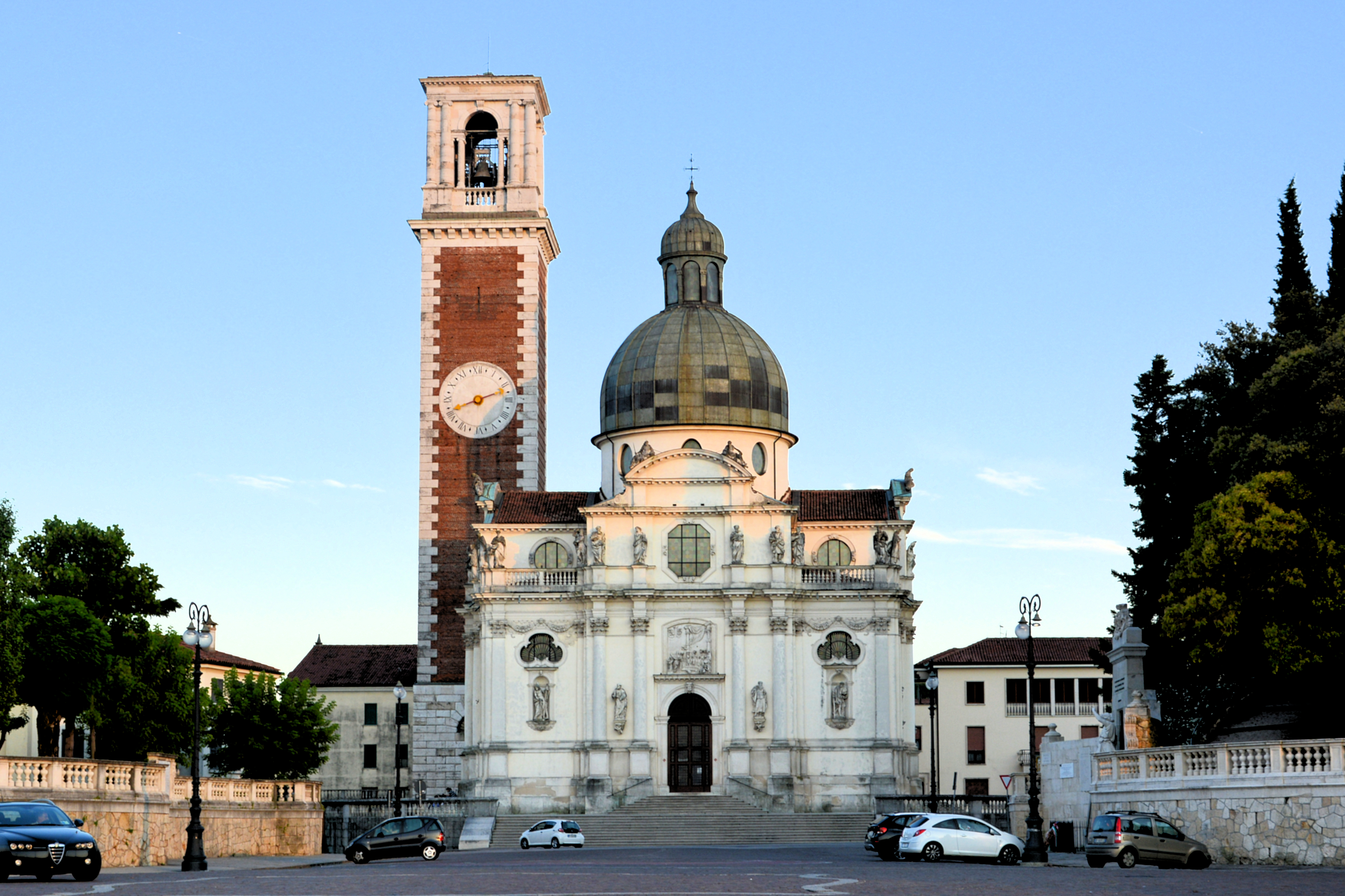 Basilica di Monte Berico This is a photo of a monument which is part of cultural heritage of Italy.